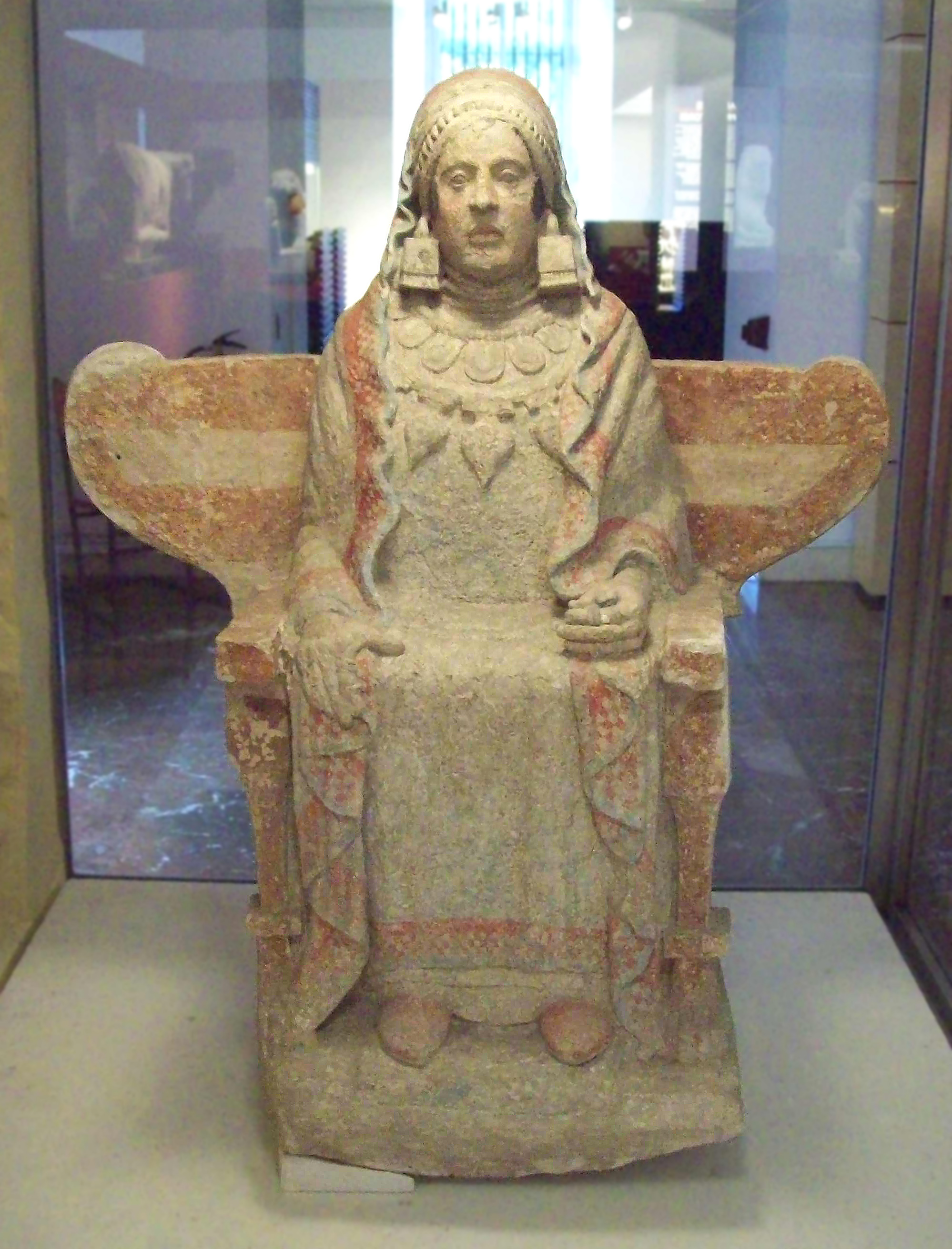 Iberian sculpture.